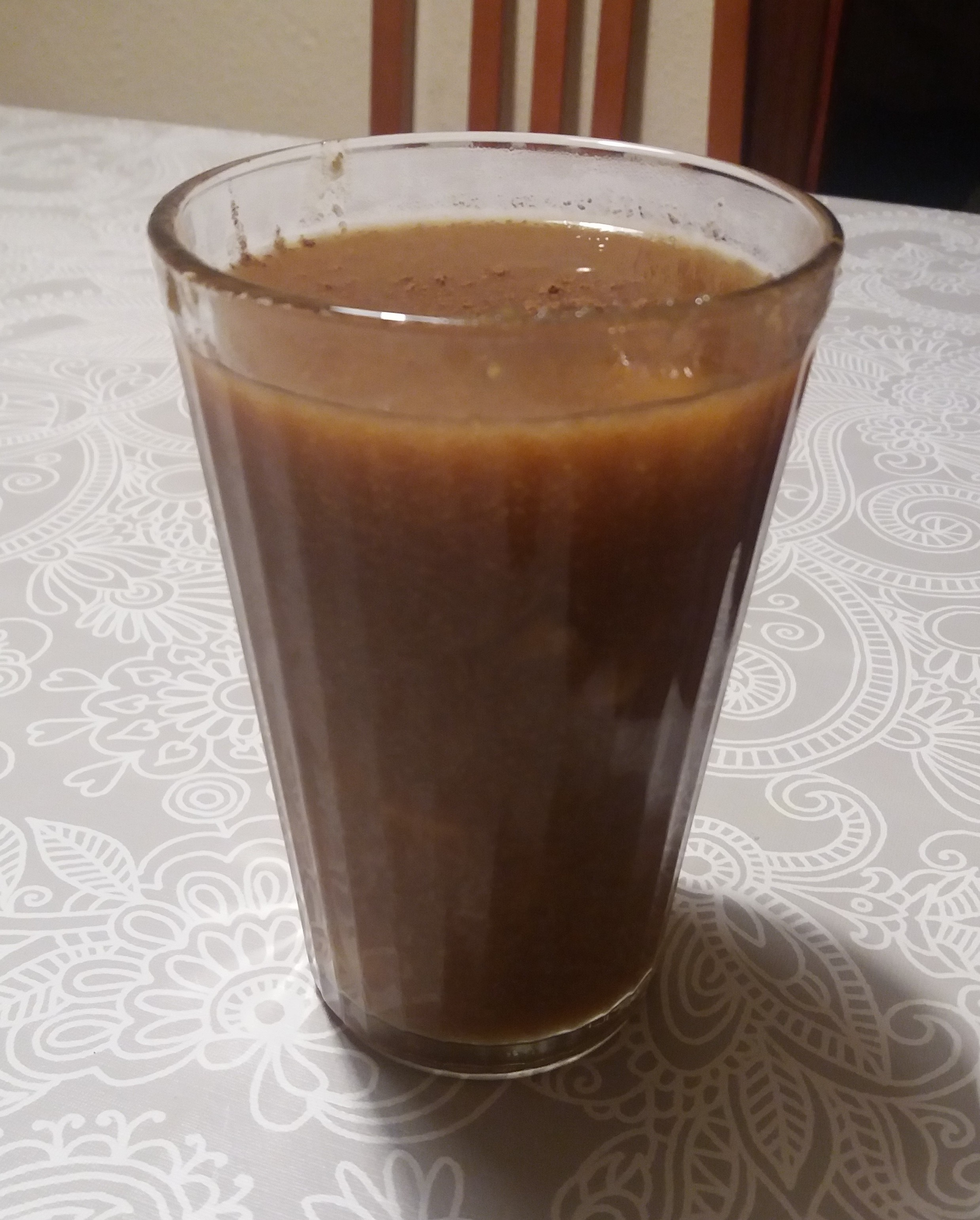 Bebida caliente limeña.